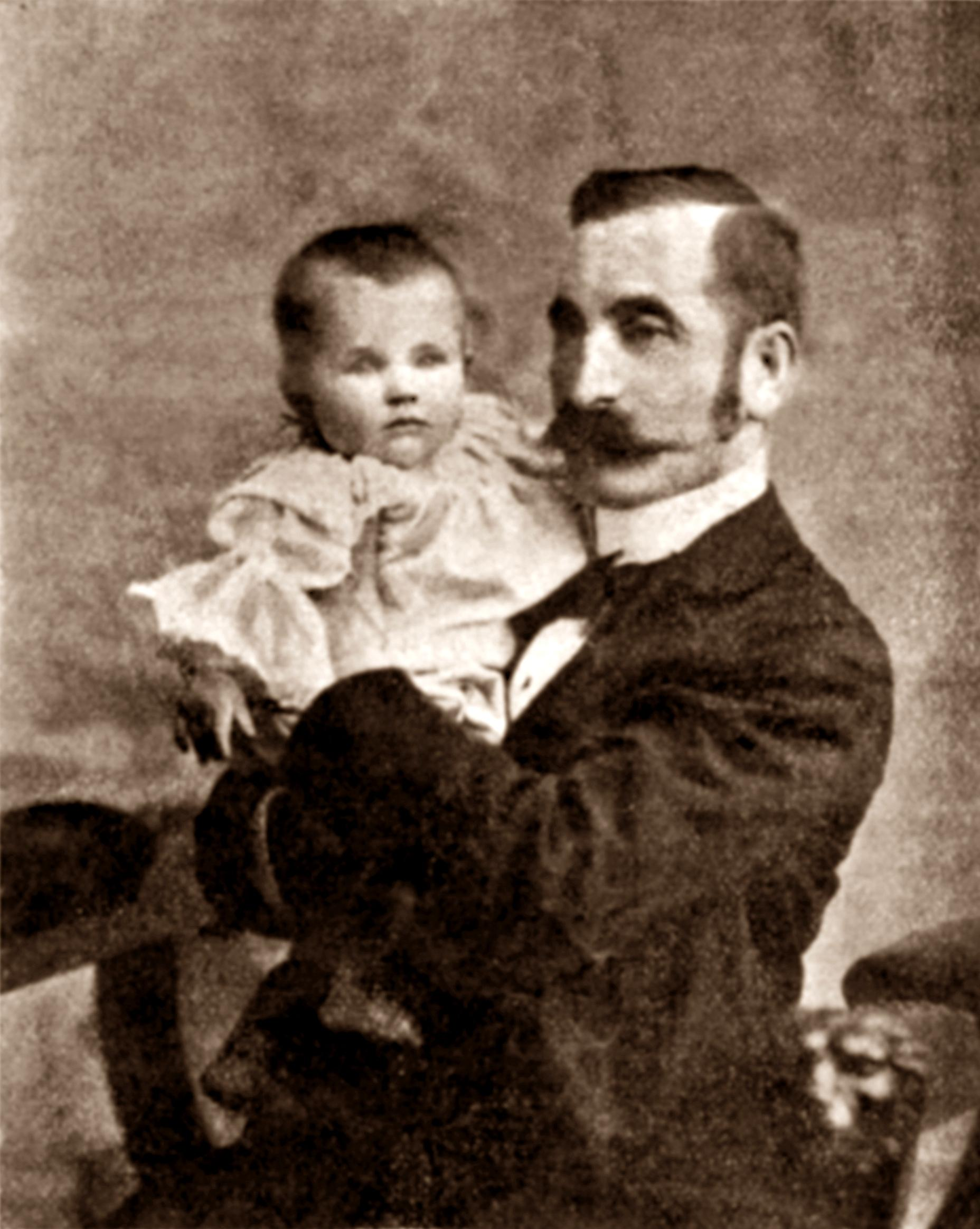 Fernando Tarrida del Mármol est un écrivain anarchiste cubain, d'origine espagnole. Né le 2 août 1861 à La Havane, il est décédé à Londres le 14 mars 1915.